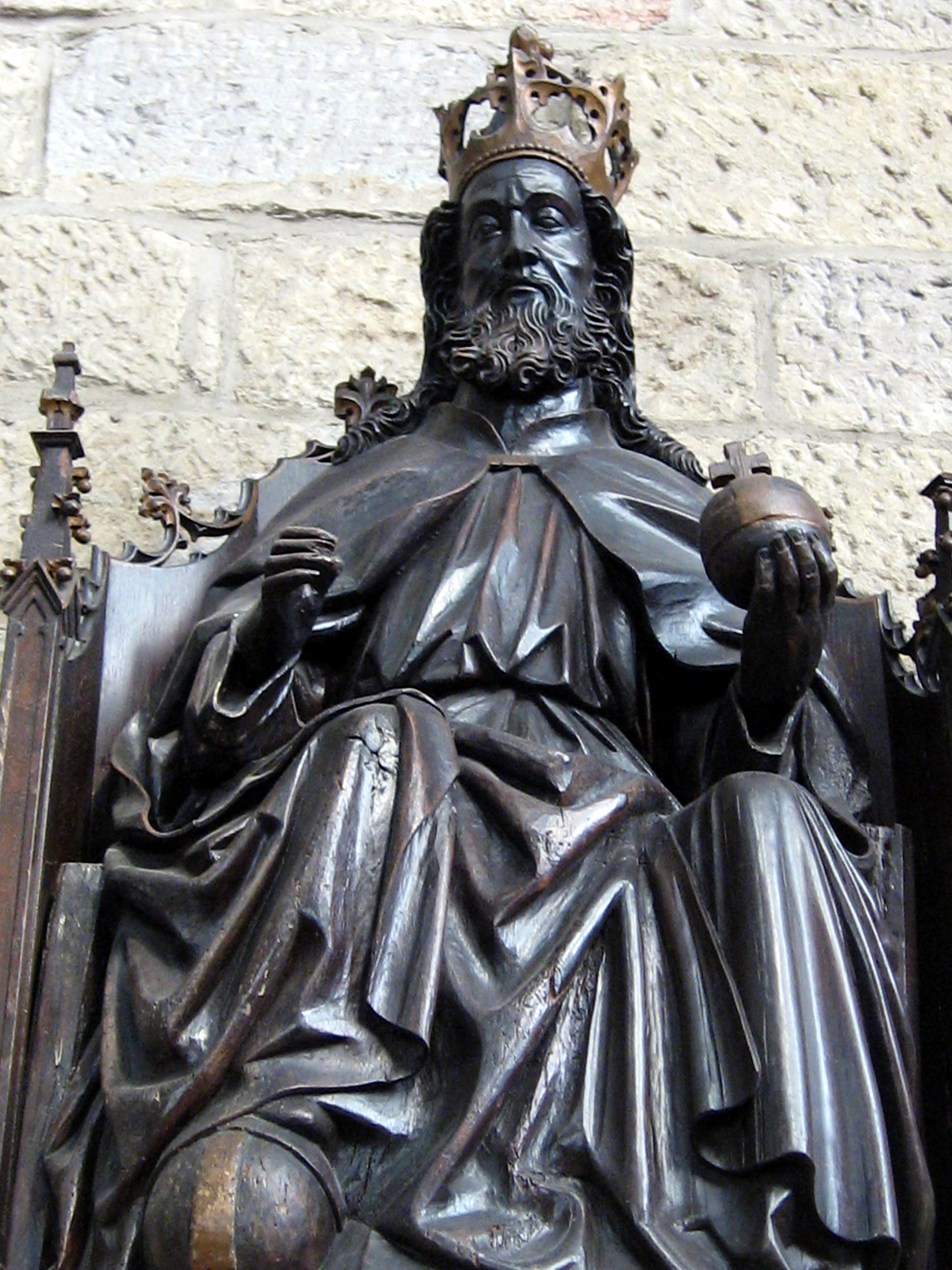 Dortmund - Marienkirche